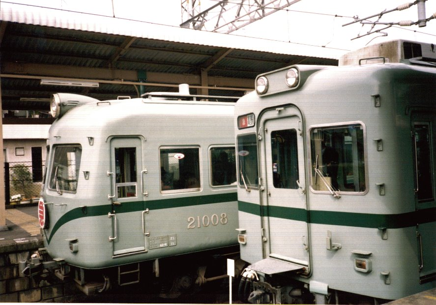 南海22000系と現役当時の21000系 どちらも旧塗色